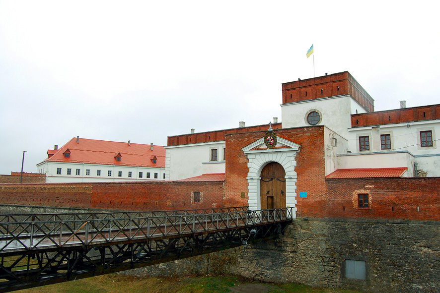 Надбрамний корпус (мур.), Дубно, вул. Шевченка